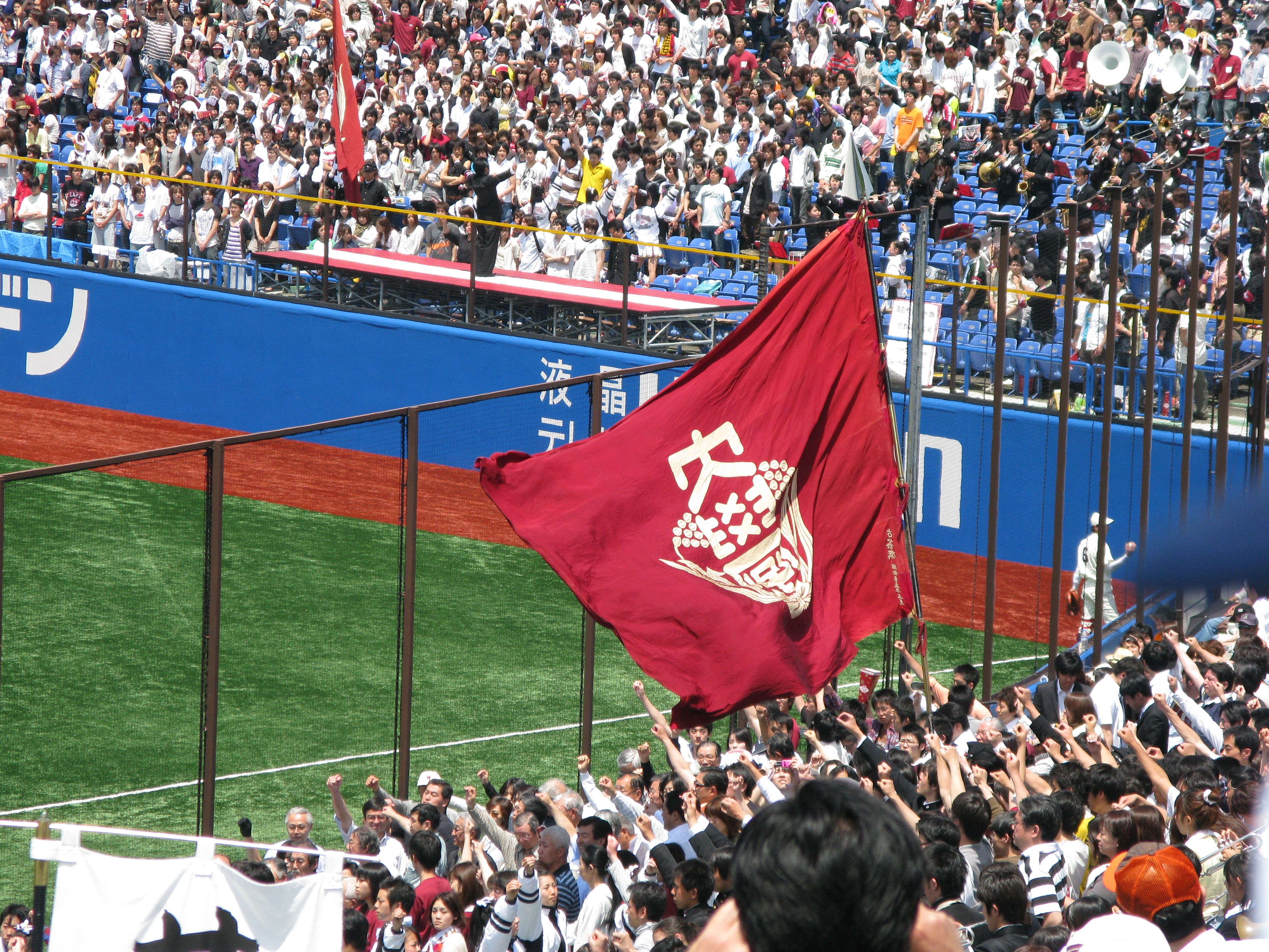 Wikipedia 10 Rennes